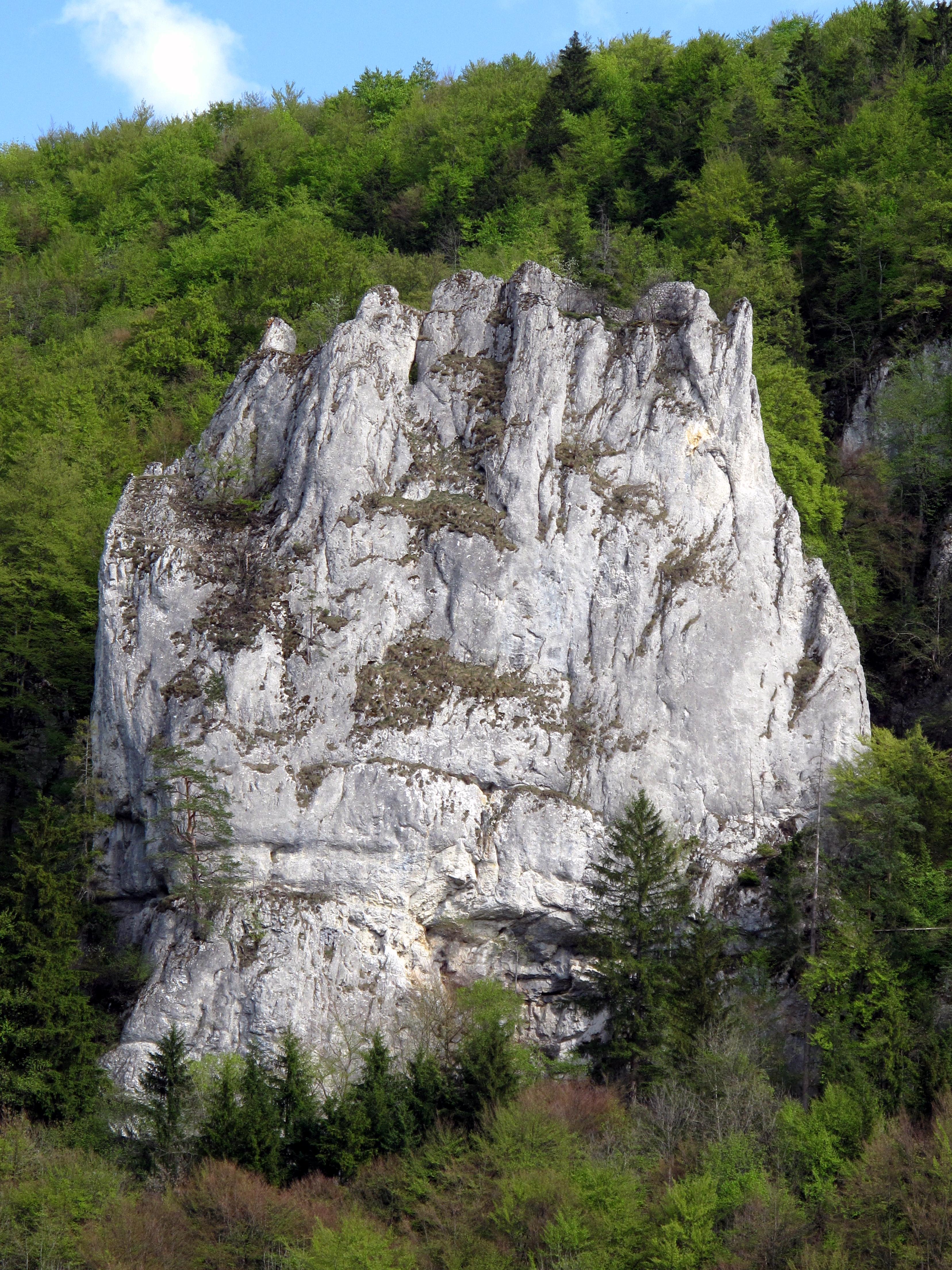 Der Donau zugewandte Seite des breiten Burgfelsen mit erkennbaren Mauerresten des Hauptgebäudes auf dem Kamm